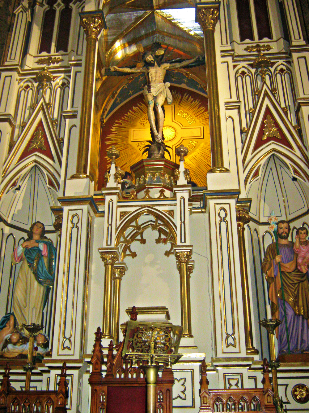 Retablo mayor de la Basílica de Ubaté